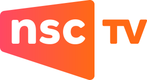 Logo do canal de televisão brasileiro NSC TV.